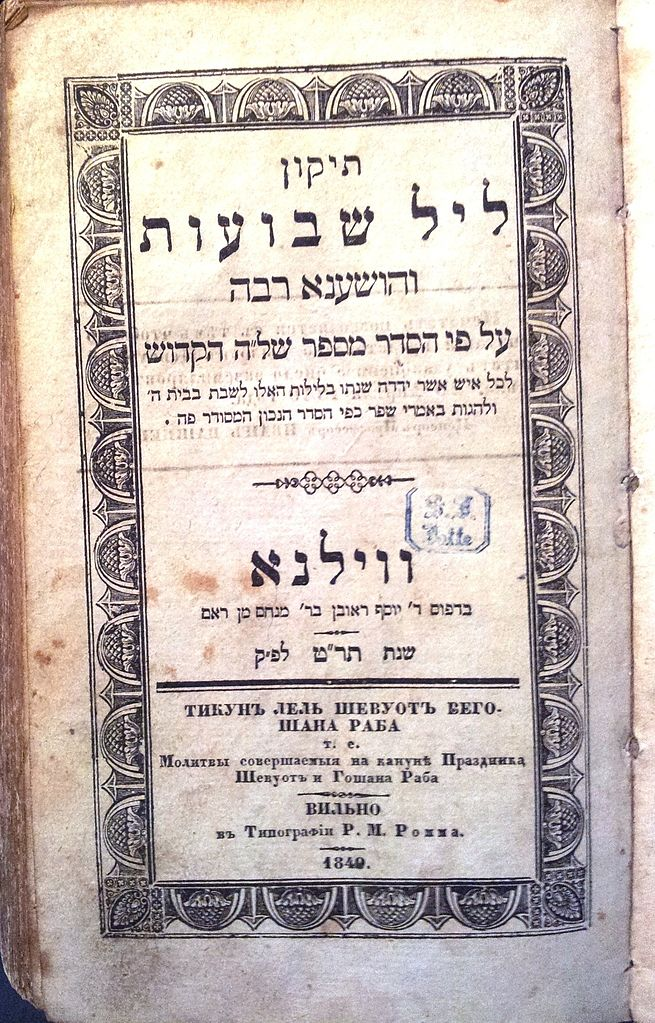 שער הספר: תיקון ליל שבועות והושענא רבה, וילנה תר"ט 1849